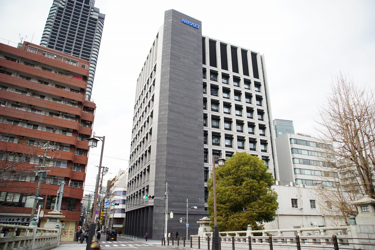 日本経済新聞大阪本社ビルです